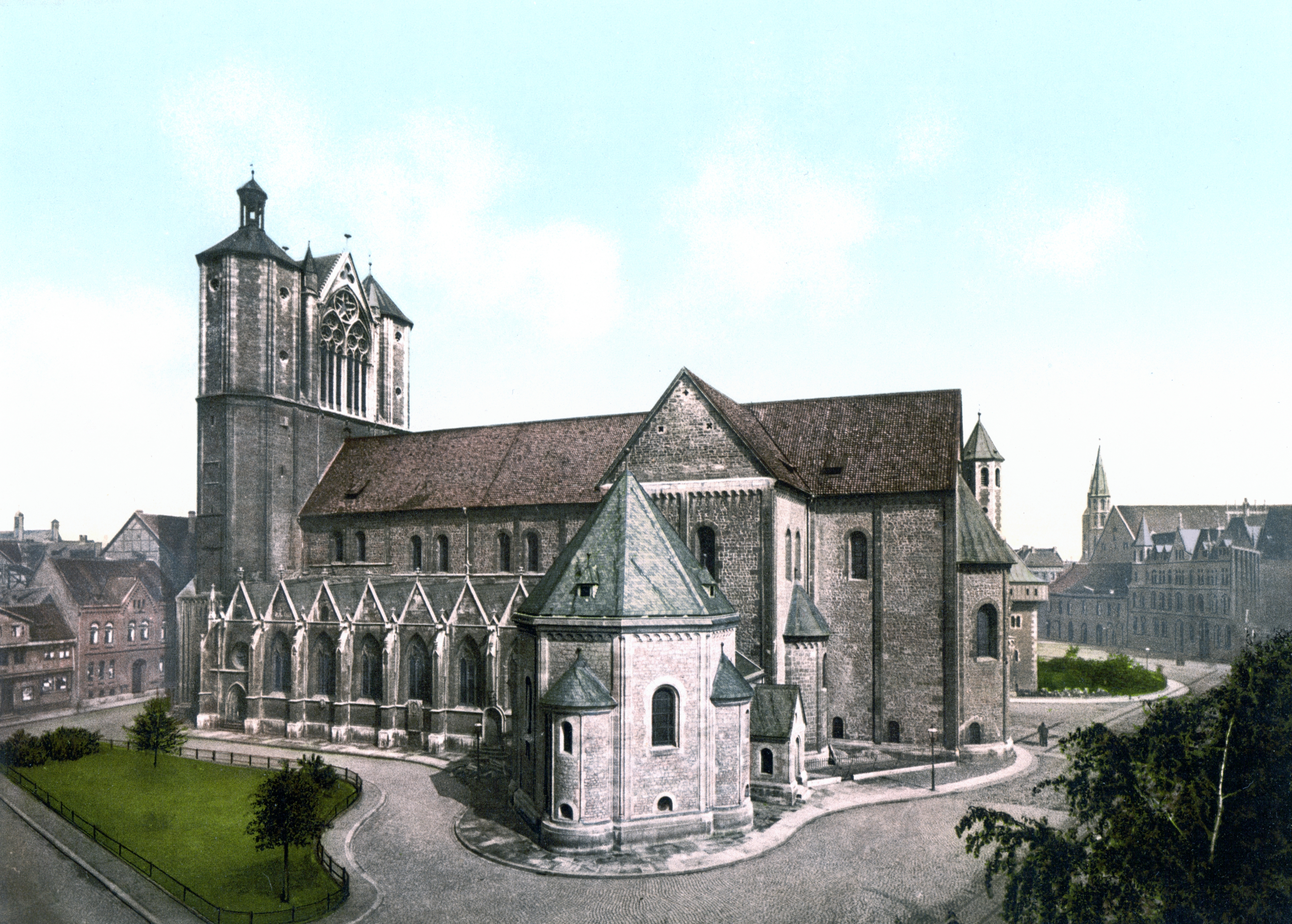 Braunschweiger Dom